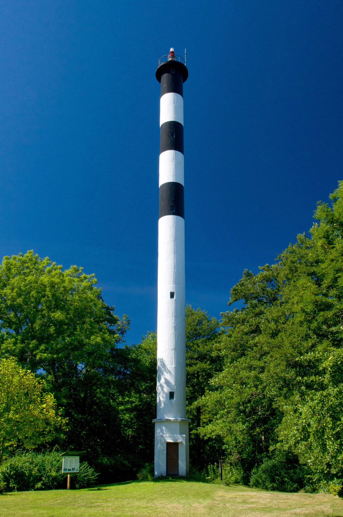 Abruka tuletorn